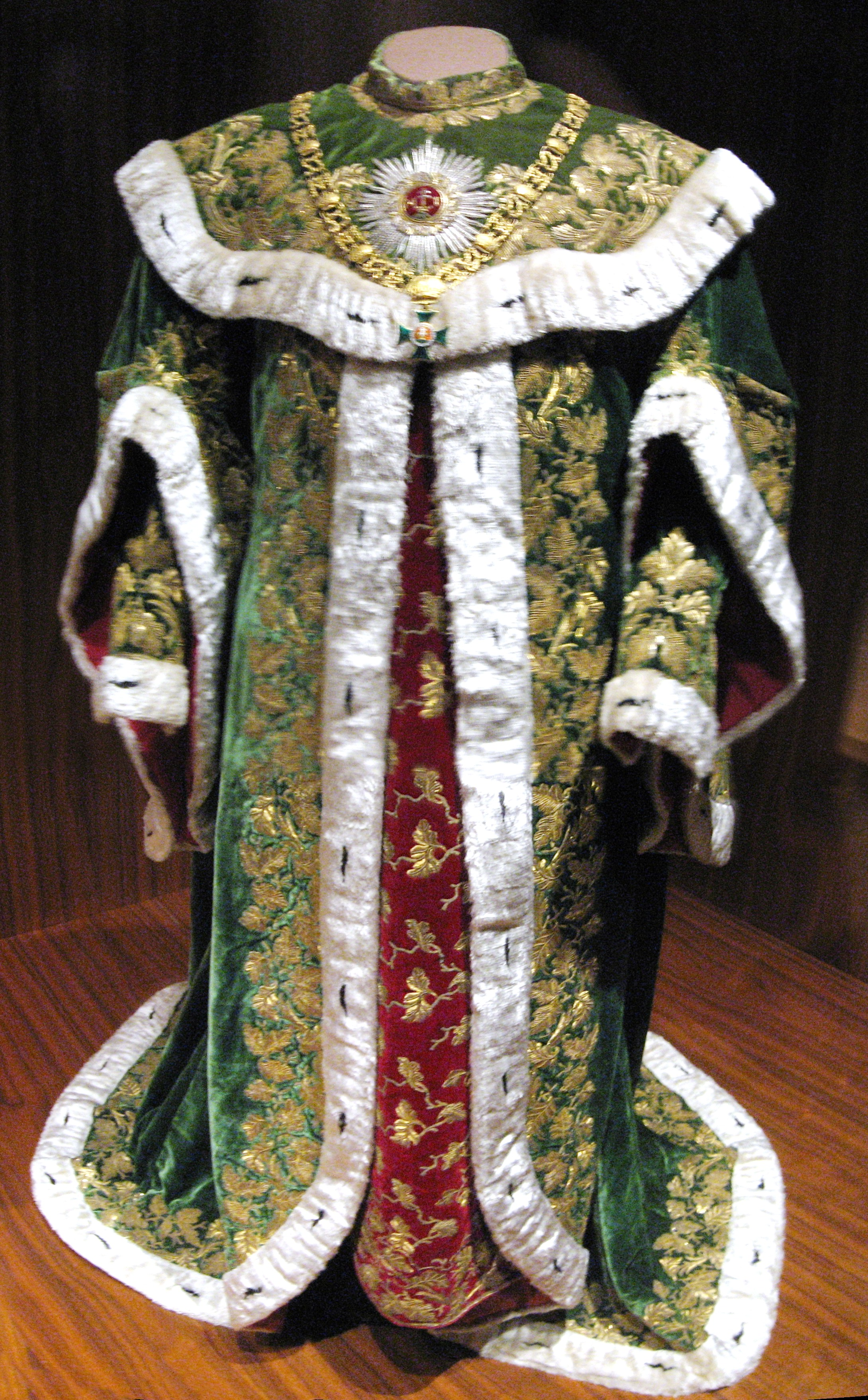 Ornat eines Ritter des St. Stephans-Ordens. Wien, um 1764. a) Mantel mit Kragen: Samt, Hermelinimitation, Gold- und Silberstickerei. b) Untergewand (Skapulier): Samt, Goldstickerei, Pailletten. c) Kalpak (ungarische Kopfbedeckung) mit Reiherfedern: Samt, Hermelinimitation, Goldstickerei. Monturdepot Inv. Nr. StO-218